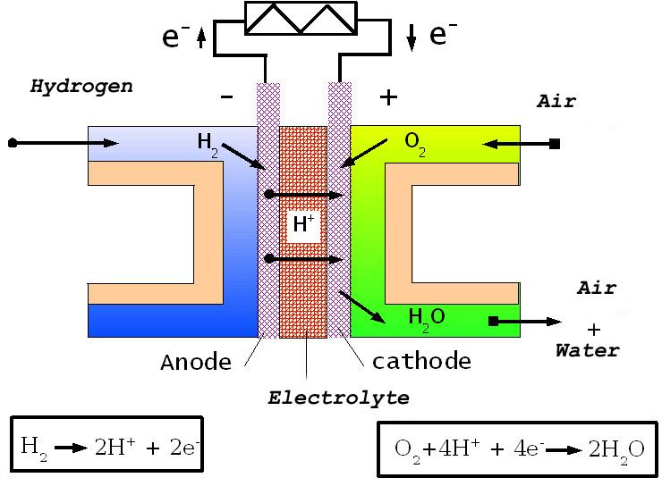 A fuel cell